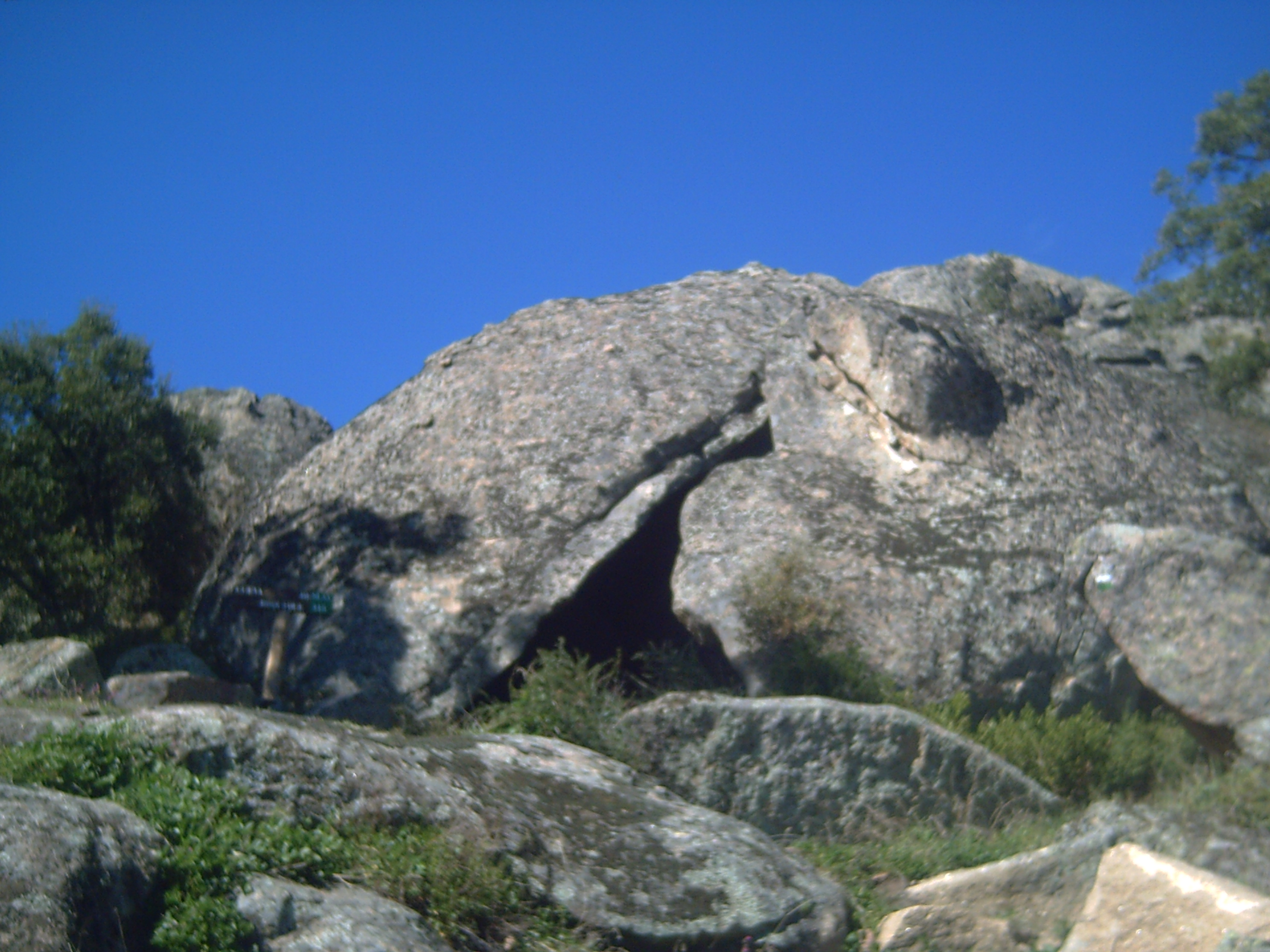 Cueva el Boquiqui endi huera